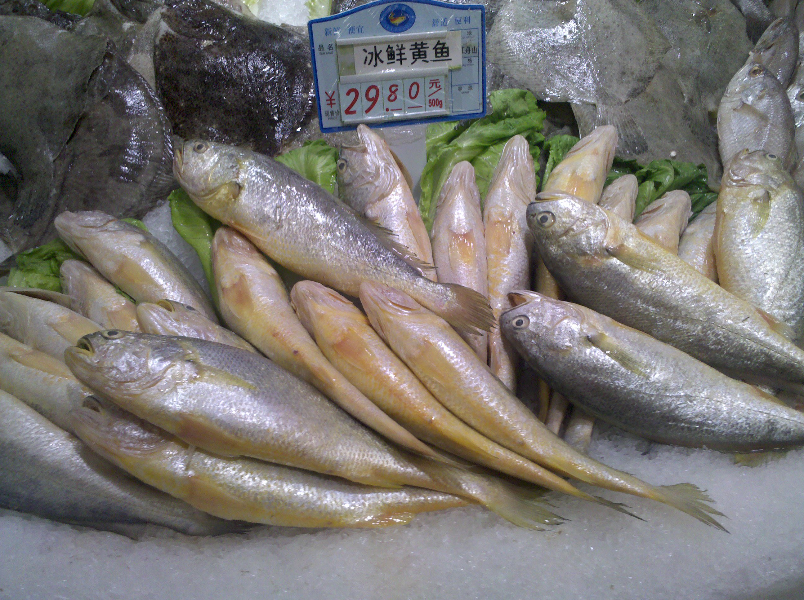 南京金润发超市中的冰冻小黄鱼